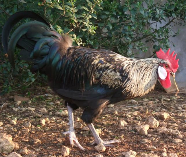 Gall mallorquí negre amb l'esclavina platejada